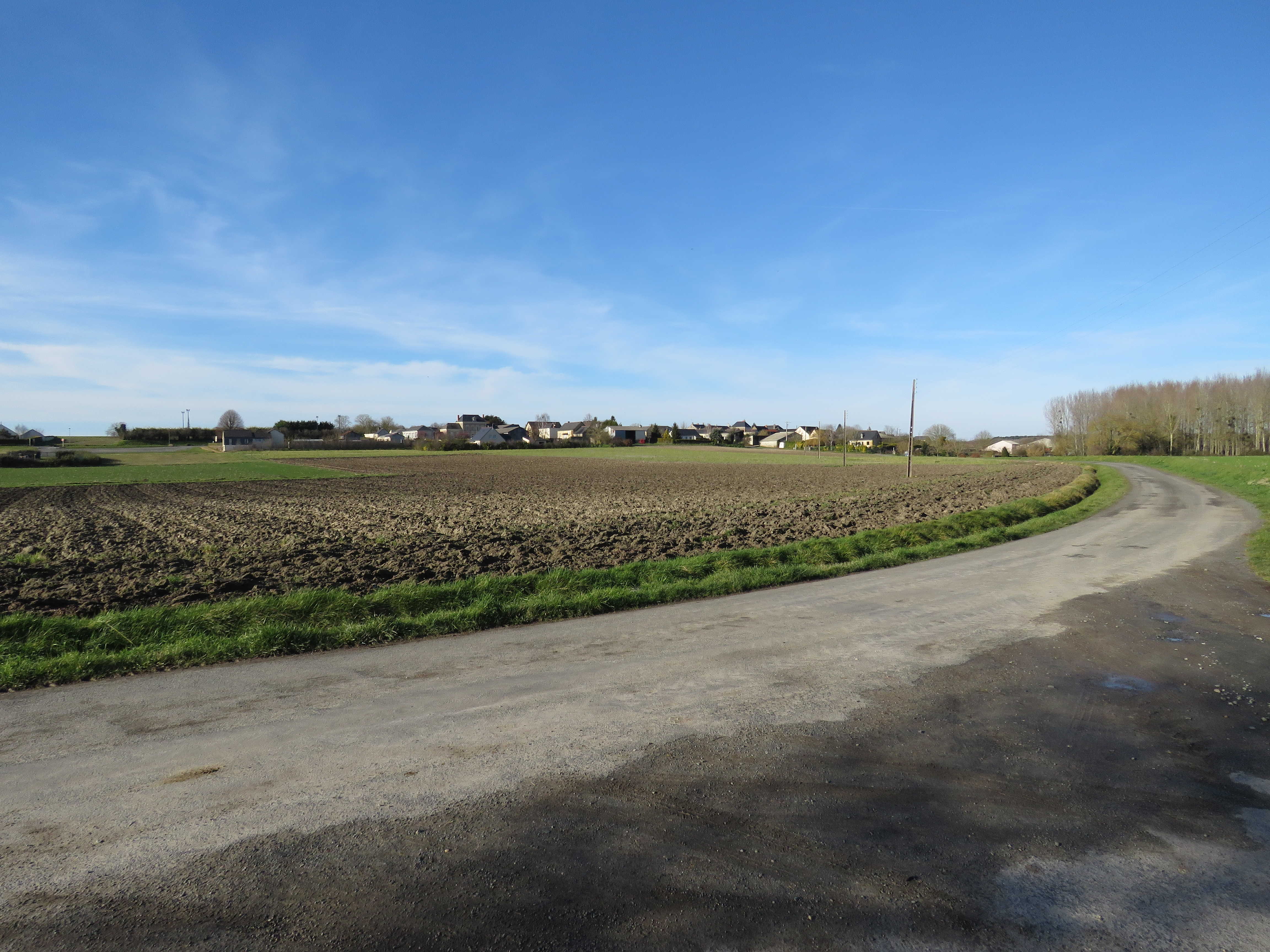 Vue du bourg.